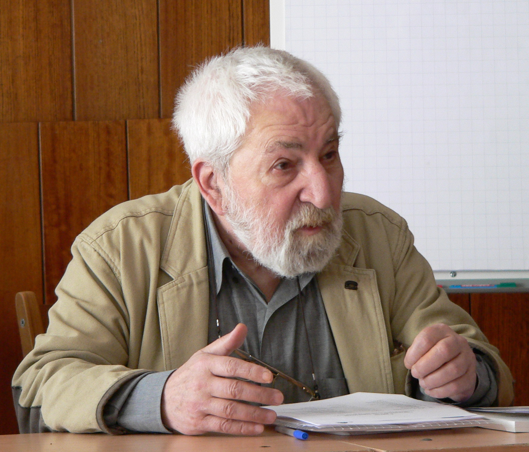 Алексей Симонов — советский и российский журналист, кинорежиссёр, правозащитник. Президент Фонда защиты гласности. Член МХГ, член Совета при Президенте Российской Федерации по содействию развитию институтов гражданского общества и правам человека.